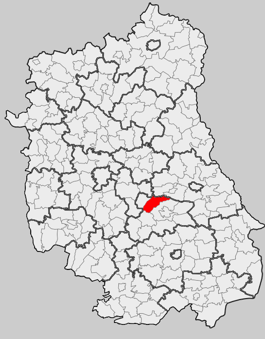 Map of gmina Łopiennik Górny, Krasnystaw county, Lublin voivodship Mapa gminy Łopiennik Górny, powiat krasnostawski, województwo lubelskie